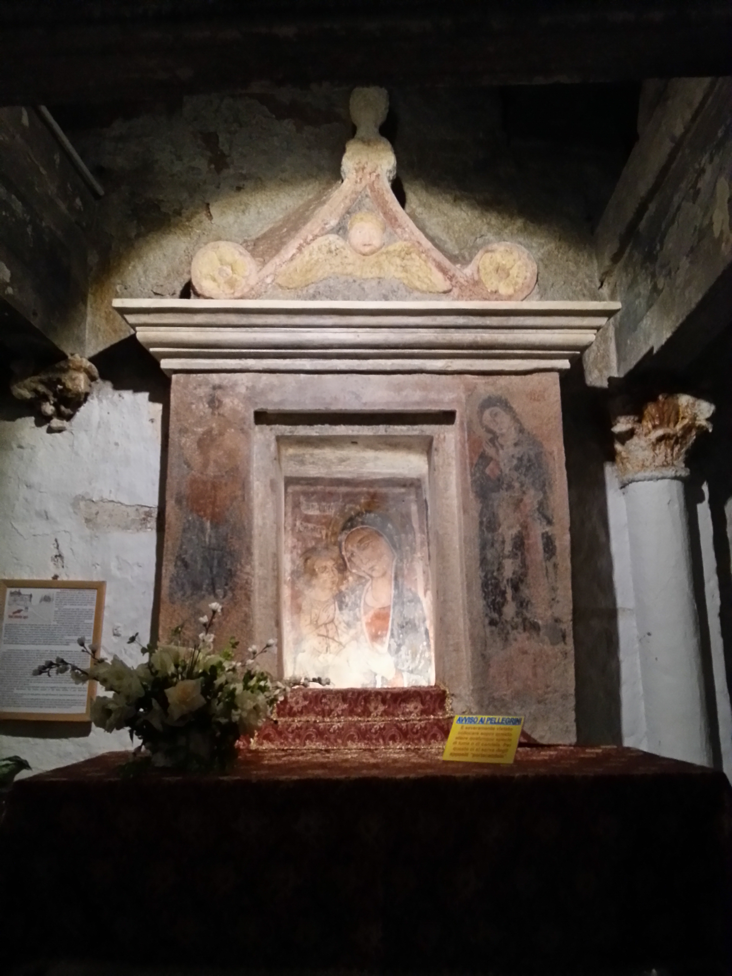 Primo altare ritraente la raffigurazione della Madonna, sul primo piano, Carovigno